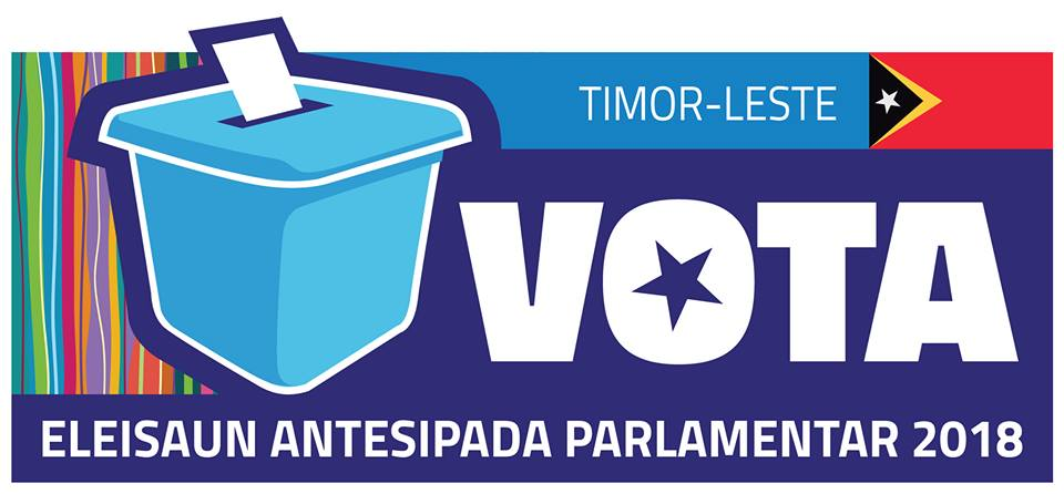 Aufruf zu den Parlamentswahlen in Osttimor 2018.